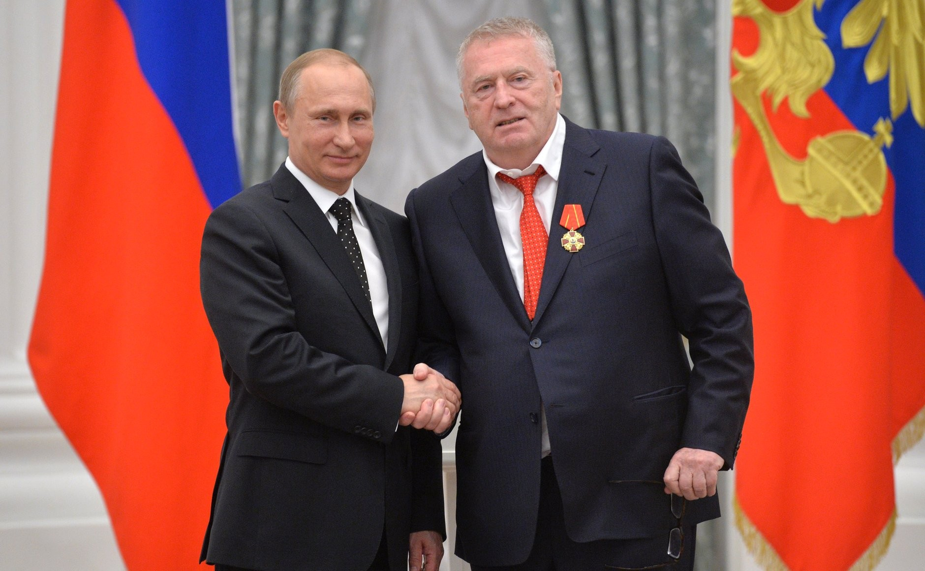 Церемония вручения государственных наград Российской Федерации. Председатель политической партии ЛДПР Владимир Жириновский награждён орденом Александра Невского